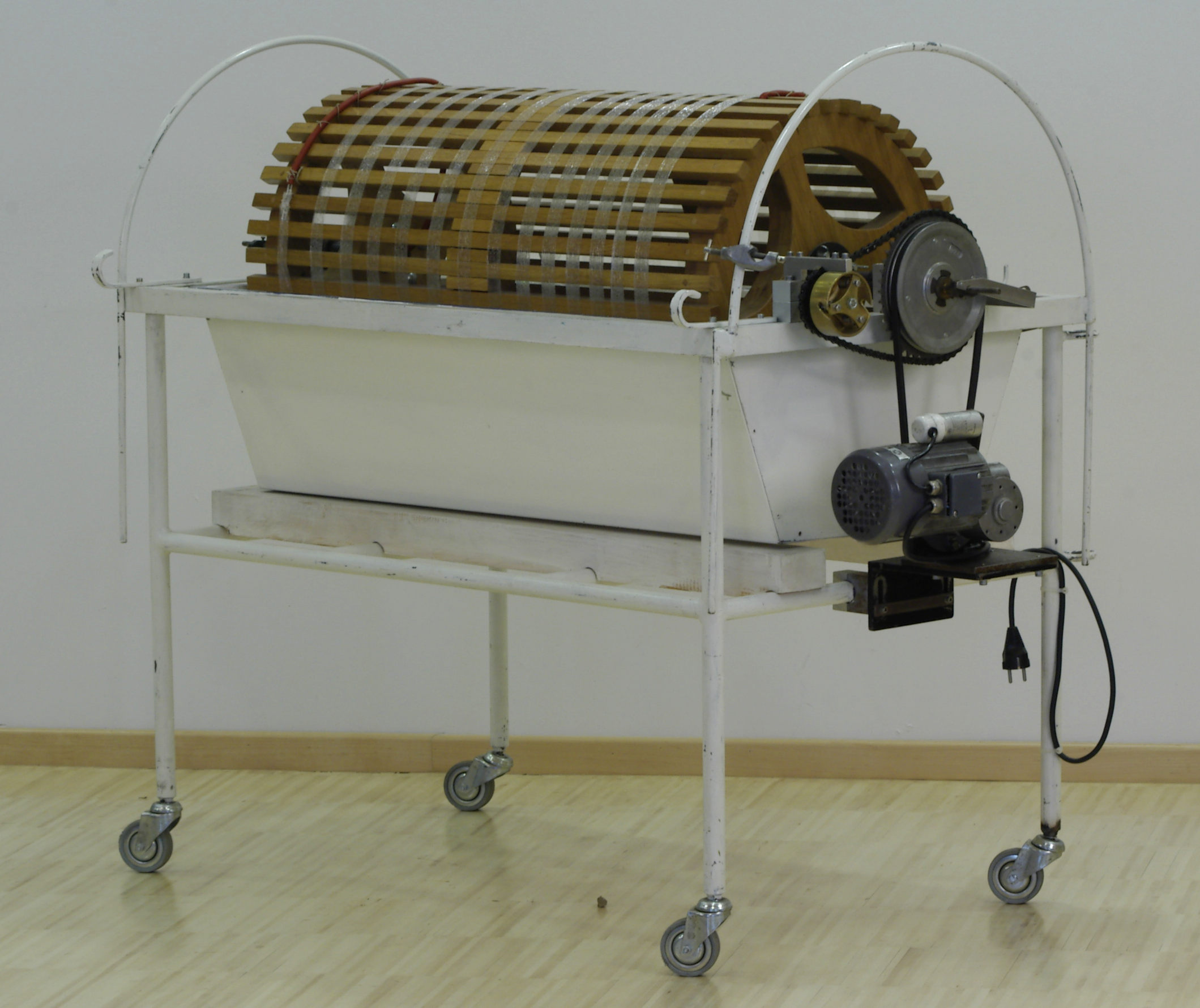 drum kidney